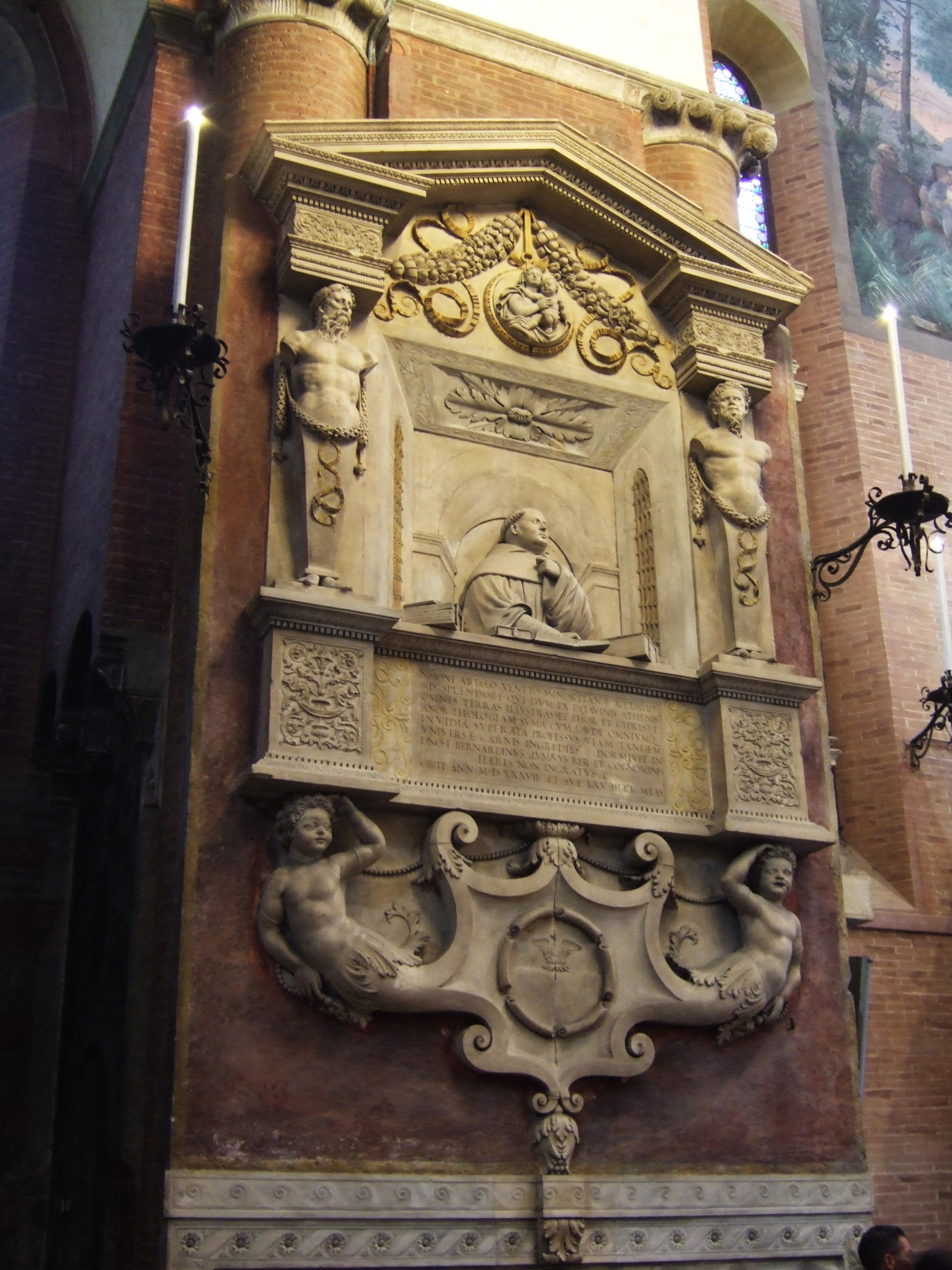 Padova - Basilica di Sant'Antonio - Monumento a Simone Ardeo, counterfacade right pillar east